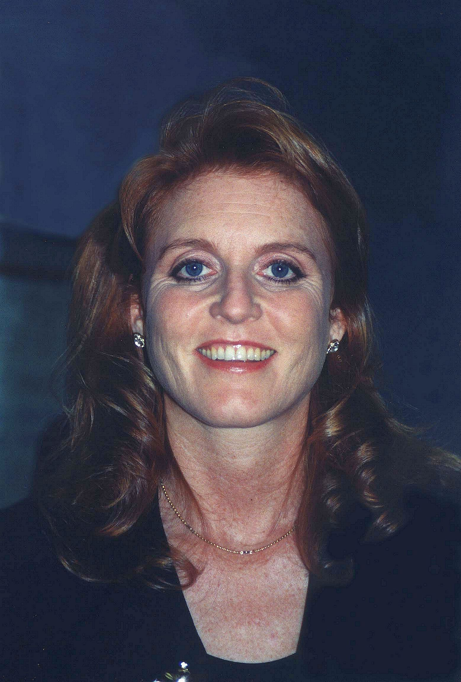 SARAH FURGESON WEIGHT WATCHERS PROMO fEBUARY 14, 1997 WASHINGTON DC